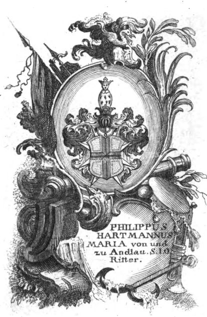 Wappenschild des Philipp Hartmann von Andlau, aus: Der Hohen Iohanniter oder Maltheser Ritter-Ordens Teutschen Gros Priorats Wappen Calender, Taf. 34